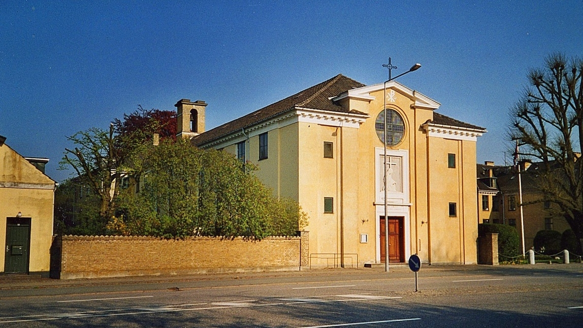 Sankt Therese Kirke (katolsk), Gentofte Kommune